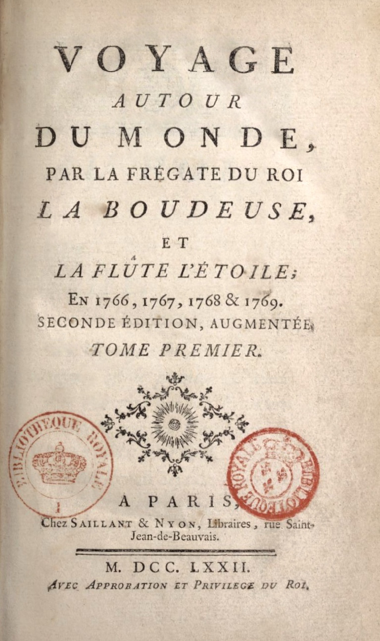 Voyage autour du monde par la frégate du roi La Boudeuse et la flûte L'Étoile ; en 1766, 1767, 1768 & 1769 . Seconde édition, augmentée. Tome premier. Bougainville, Louis Antoine de (1729-1811). À Paris, chez Saillant & Nyon, libraires, rue Saint-Jean-de-Beauvais. M. DCC. LXXII. Avec approbation et privilege du Roi.